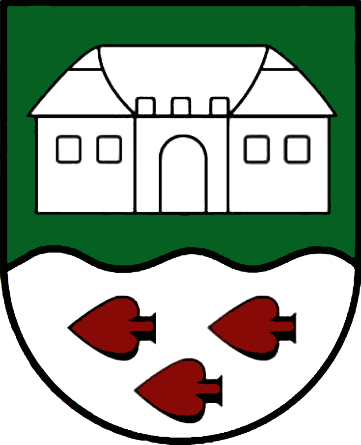 Die einzelnen Motive für das Wappen wurden nach geschichtlichen Quellen, die im Landesarchiv aufliegen, künstlerisch gestaltet. Im oberen Teil ist ein zweigiebeliger Trutzhof mit Walmdächern und Zinnen über dem Hofeingang dargestellt. Dies ist eine typische Form der Bauernhöfe zur Zeit der feindlichen Einfälle aus dem Osten. In einer Urkunde aus dem Jahre 1354 scheint der Name „WIGAND AM HOF“ auf. Später leitet sich daraus der Name „Weiglhof“ ab, nach dem die Gemeinde auch ihren Namen erhielt und auch jetzt noch der Name für die Katastralgemeinde ist.